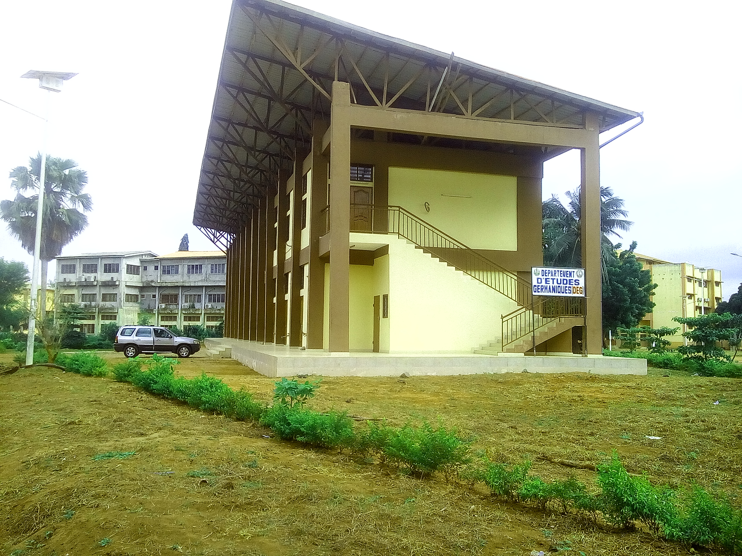 GERMANIQUE DÉPARTEMENT